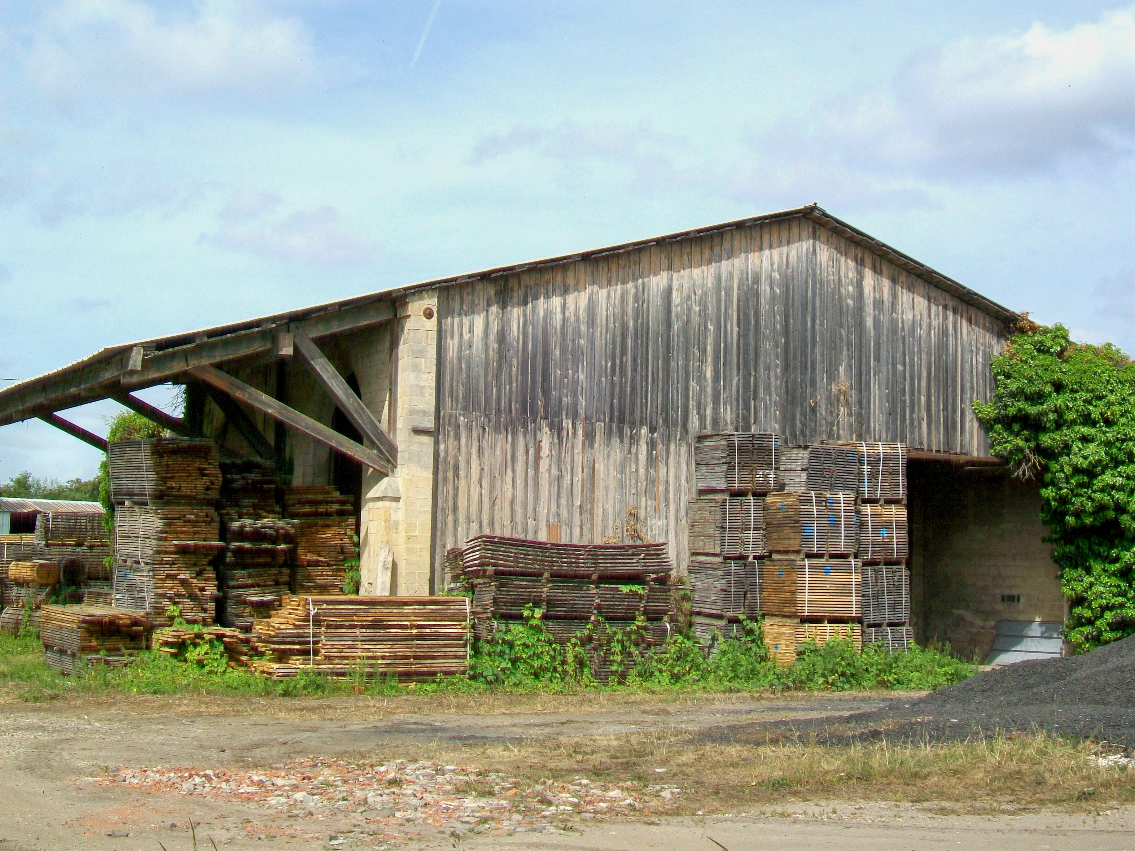 L'ancienne halle à marchandises de la gare de Saint-Firmin, qui n'est plus connectée au réseau ferré depuis 1971. Son utilisation par une scierie à sauvé cette halle de la destruction.